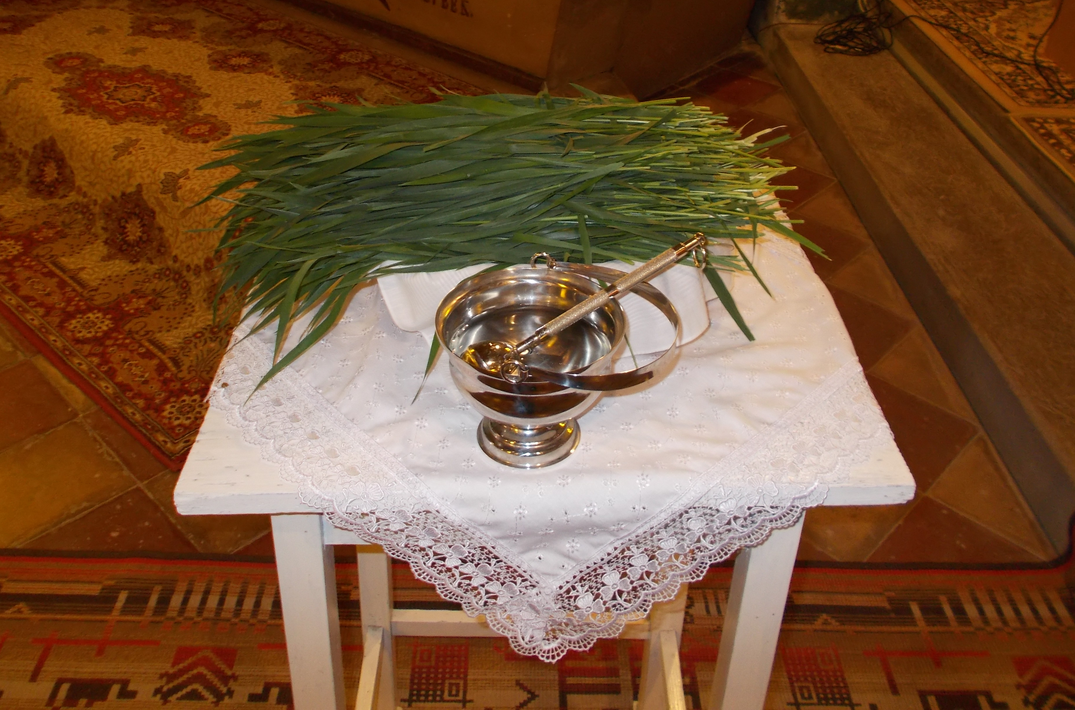 Szentelésre (latin: litaniae maiores) előkészített búza a Sajónémeti templomban.Prepare to Wheat blessing in Sajónémeti church